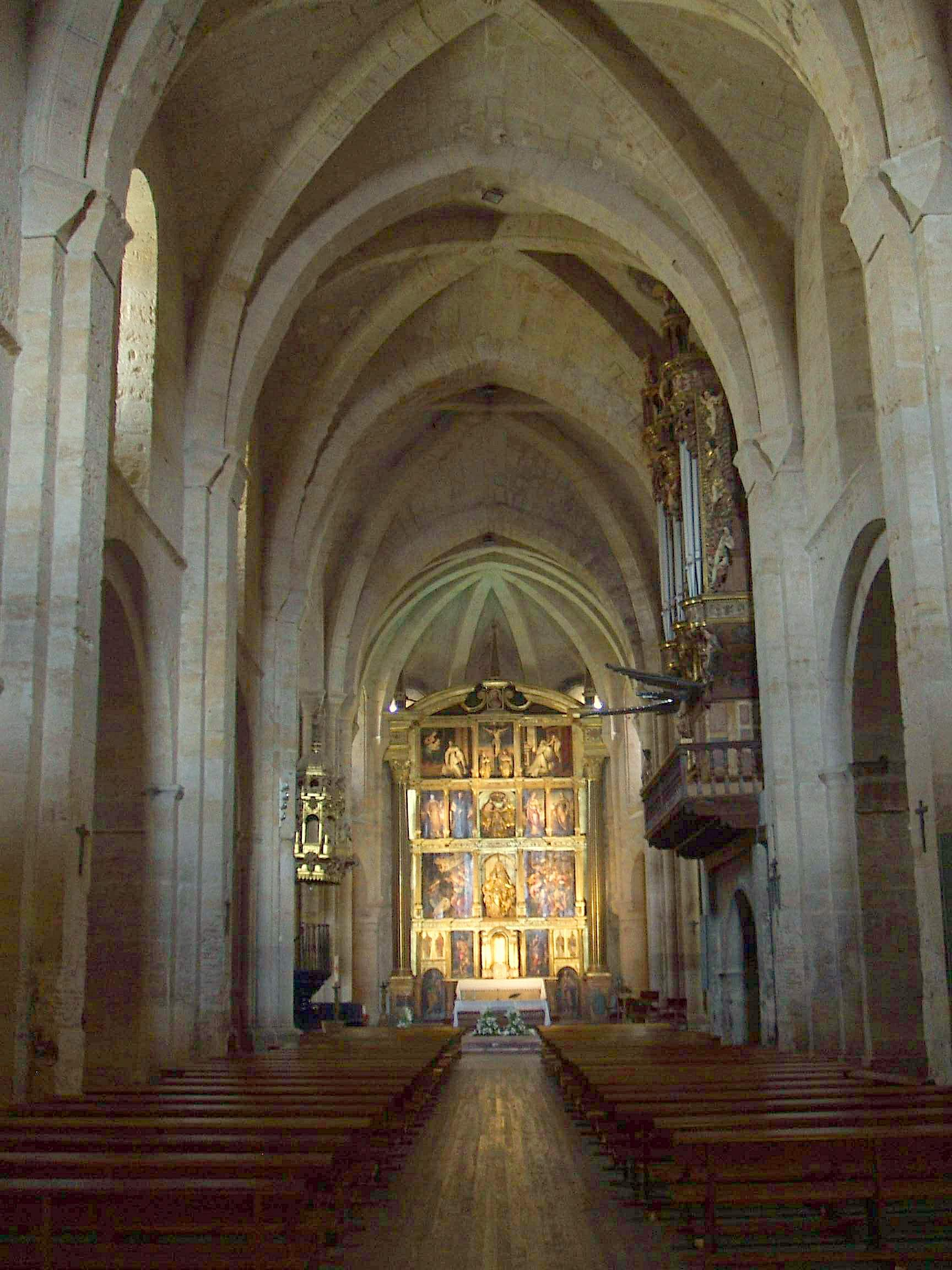 Iglesia del Monasterio de Santa María la Real, Fitero (Navarra)